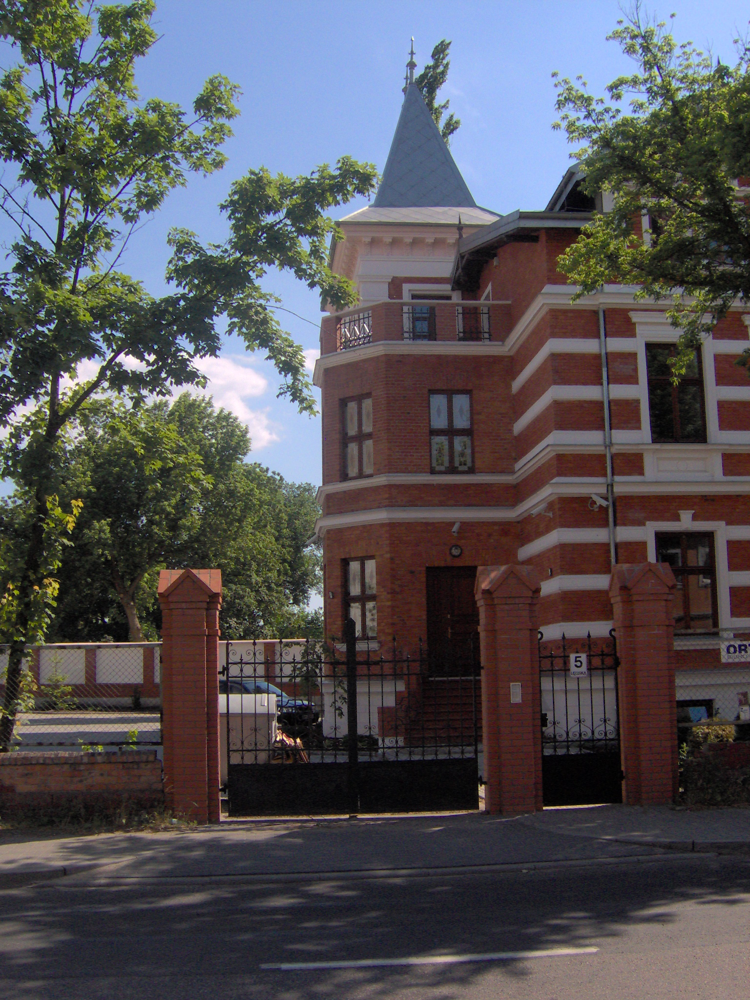 Pozostałości po celulozie (2007 r.)